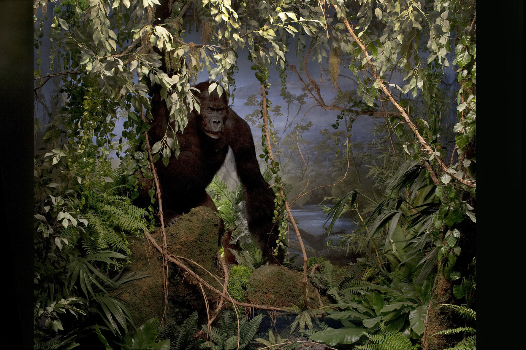 Der Gorilla ist Teil der historischen Afrika-Dioramen im Naturhistorischen Museum Bern.